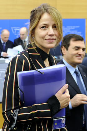 Delegación del Parlamento Europeo en la COP20